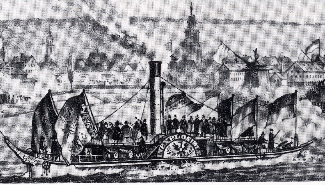 Neckar-Dampschifffahrt in Heilbronn 1841. Lithografie